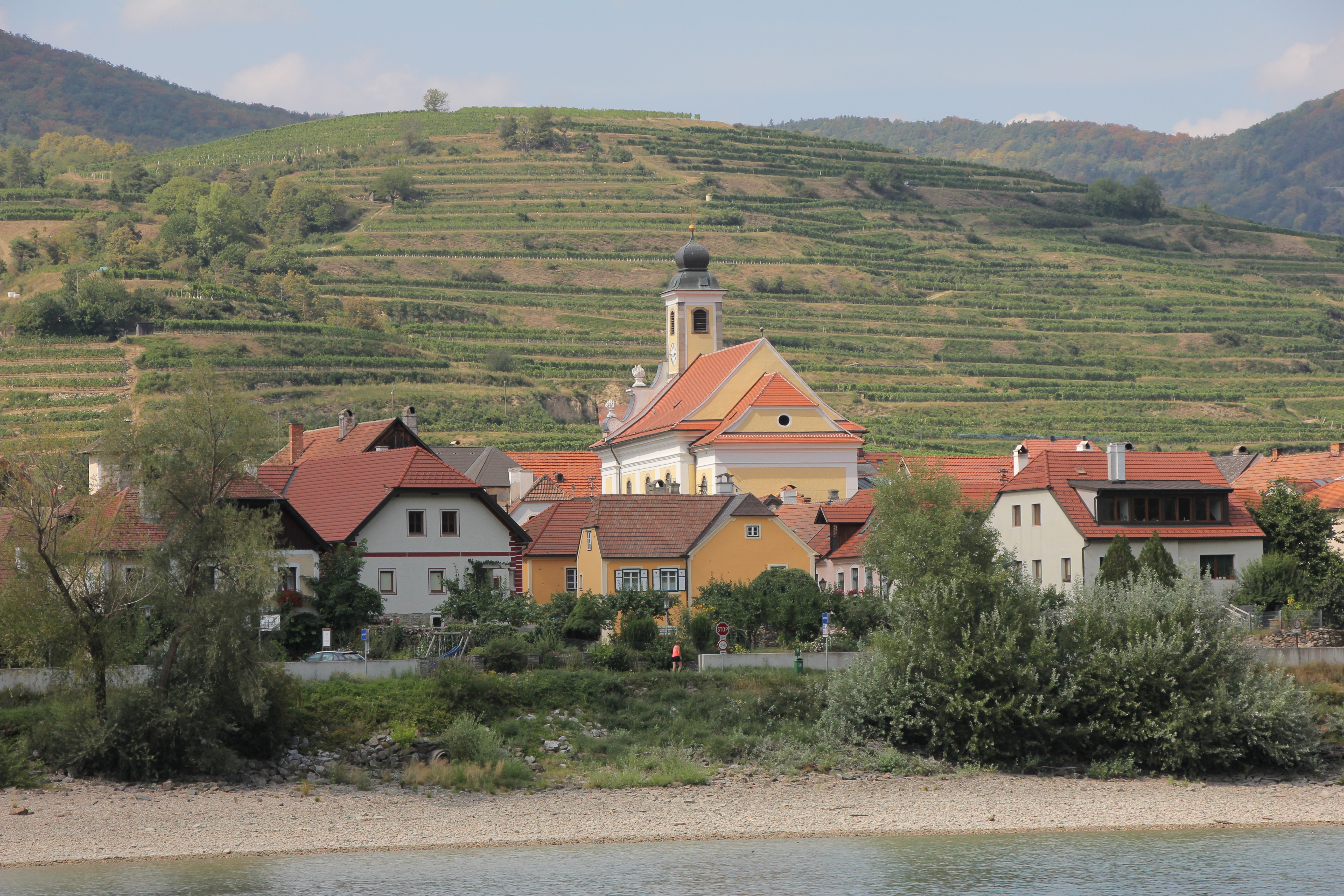 Eindrücke bei einer Schifffahrt durch die Wachau